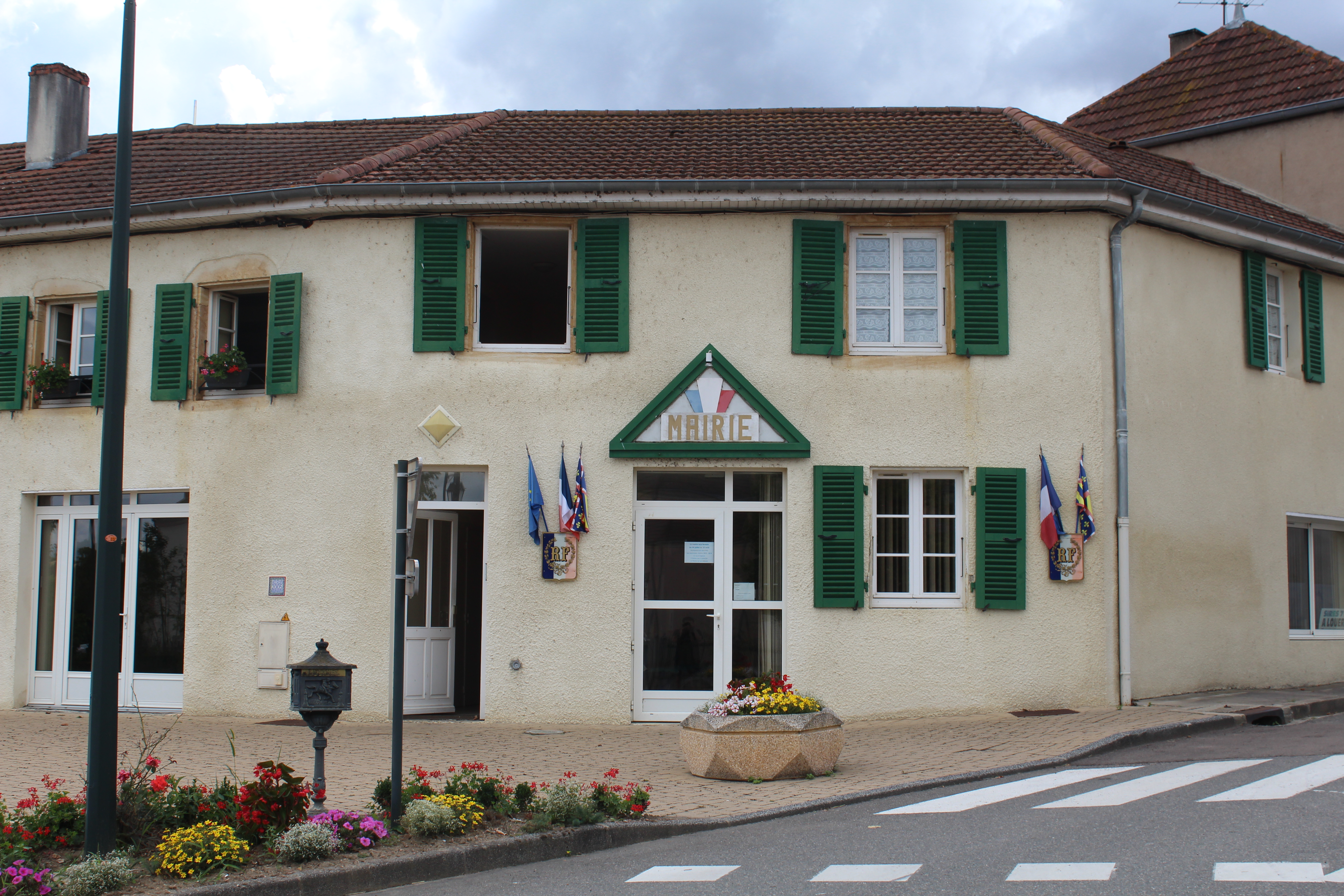 Mairie de Chenay-le-Châtel.